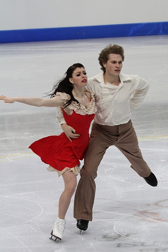 Николь Офорд и Томас Уильямс (Канада) на чемпионате мира по фигурному катанию среди юниоров 2012